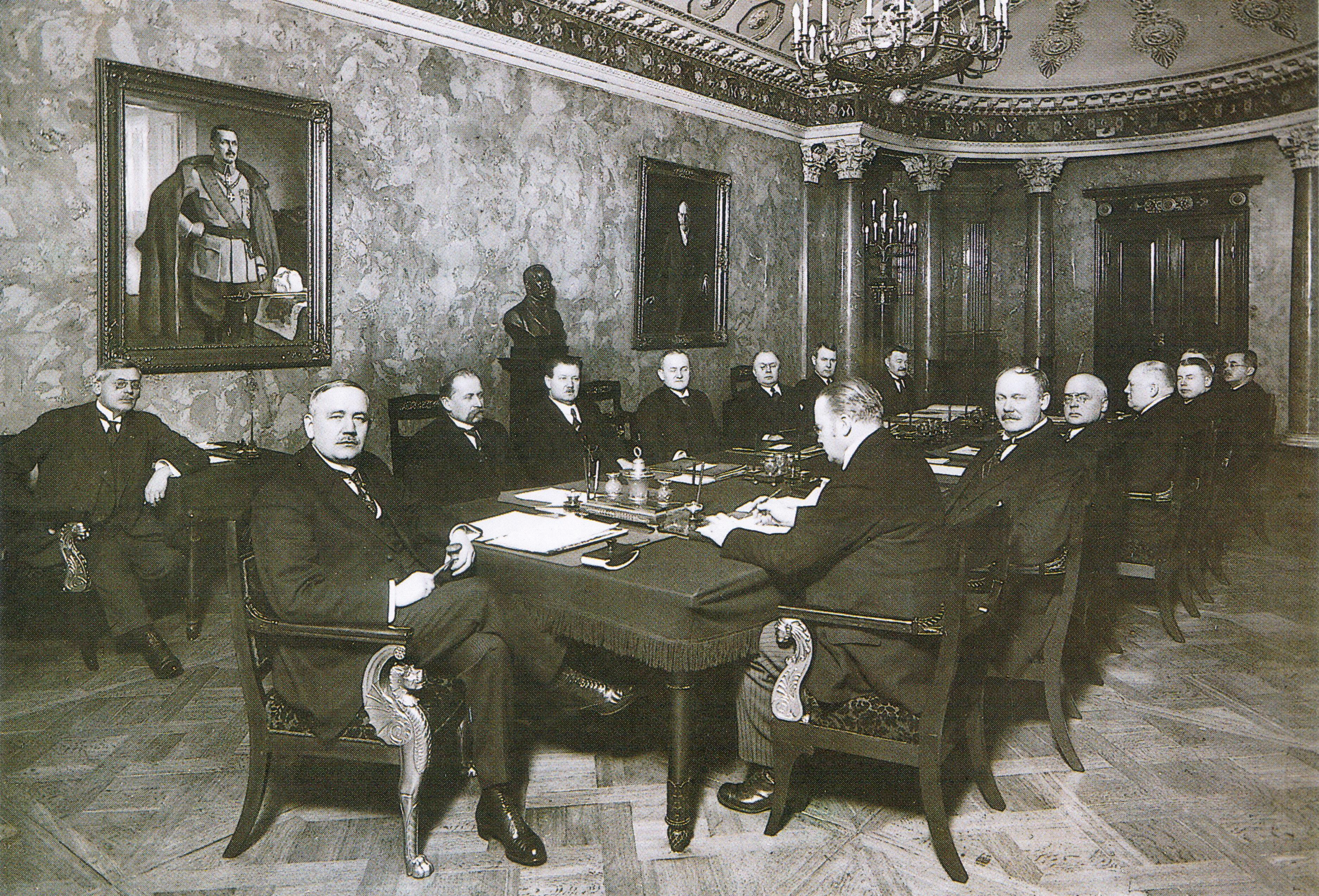 Antti Tulenheimon hallitus viimeisessä istunnossaan. Edessä presidentti Lauri Kr. Relander, pöydän takana ensimmäisenä Kyösti Kallio, pöydän edessä selin Tulenheimo ja E. N. Setälä.